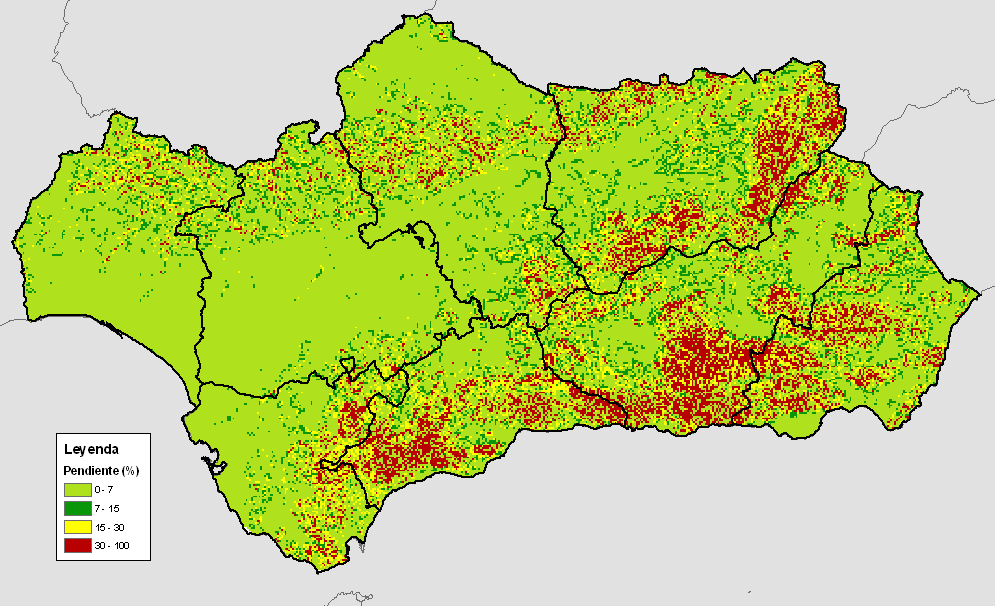 Mapa de Pendientes de Andalucía agrupados en 4 niveles.